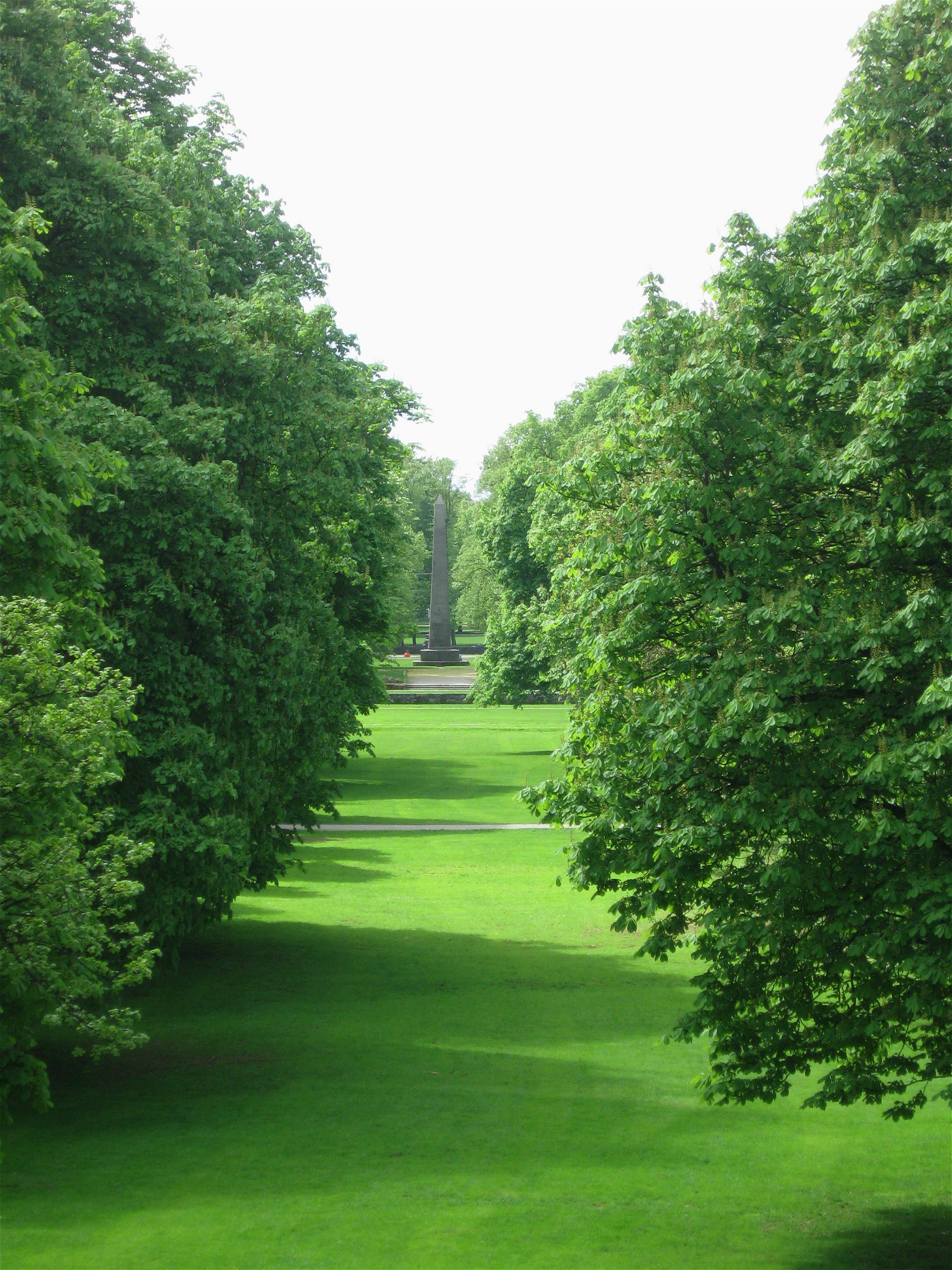 Luitpoldpark, München. 1910–11 angelegt (12,5 ha), verbindet regelmäßige Elemente mit Zügen des Landschaftsparks. Nach 1945 um das Gelände des Schuttberges nach Norden erweitert.